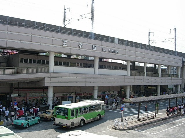 일본에 위치한 오지 역